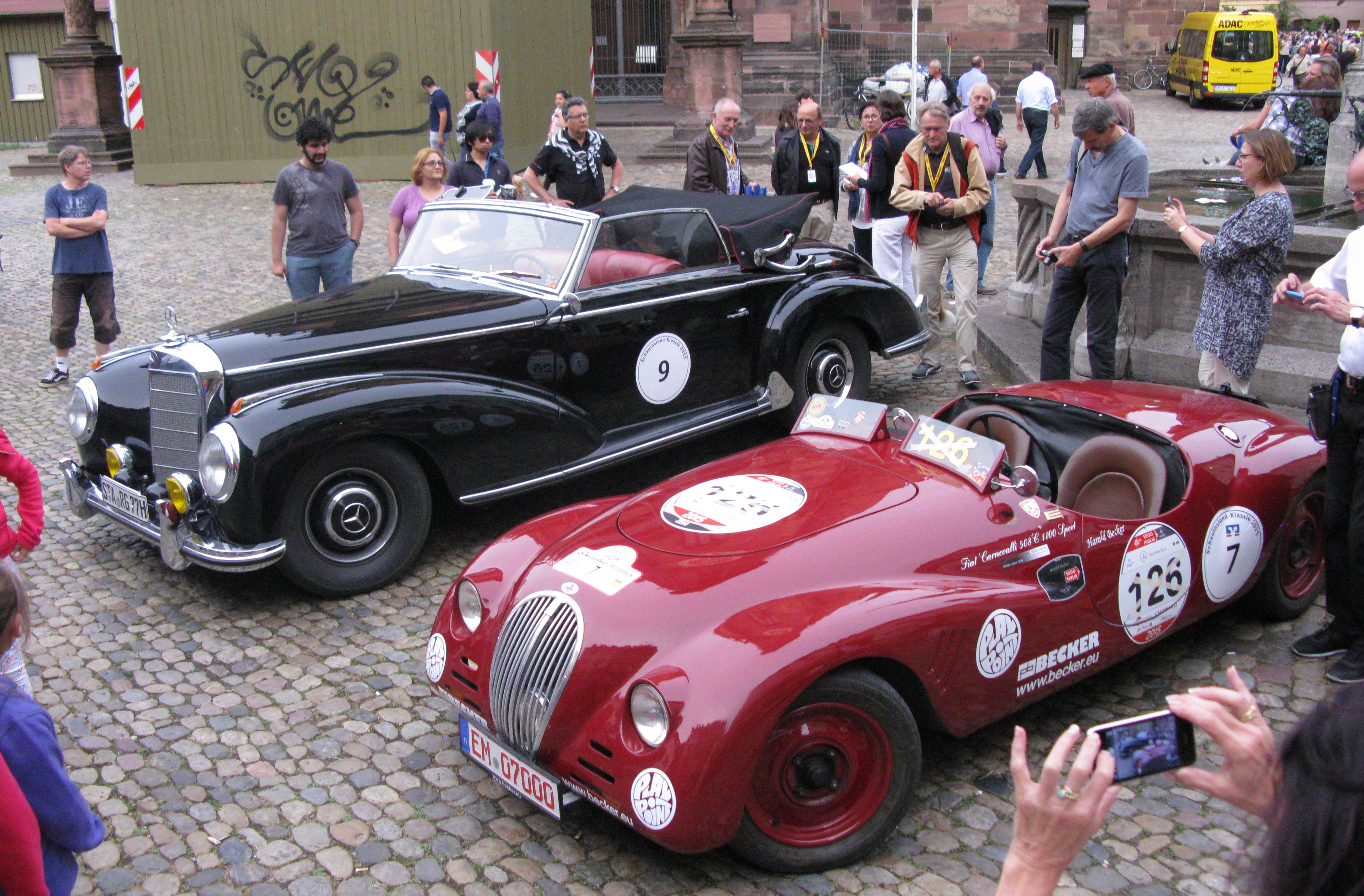 Oldtimer der Schauinsland-Klassik auf dem Freiburger Münsterplatz